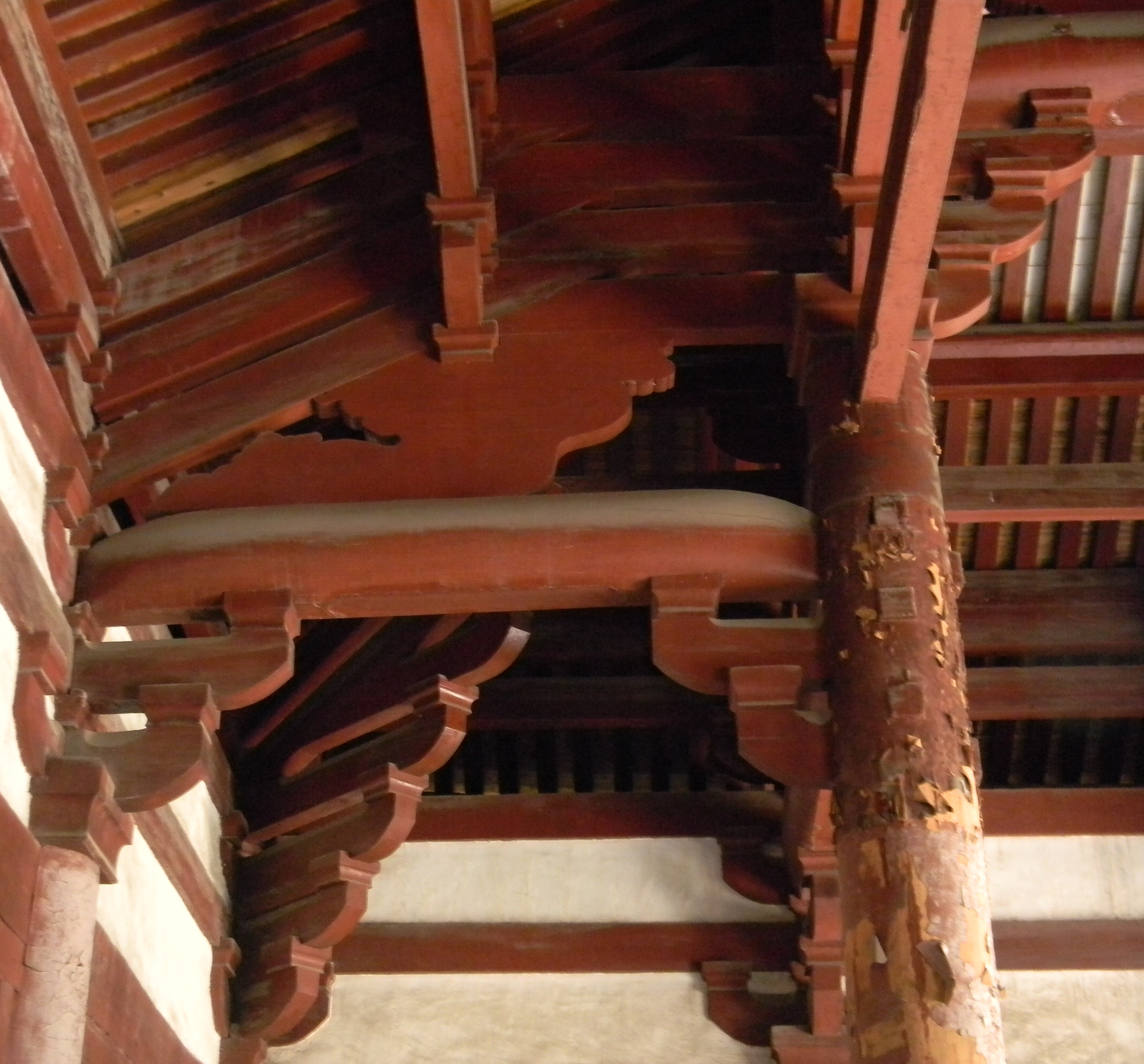 华林寺大殿内丁字栱、月梁及驼峰